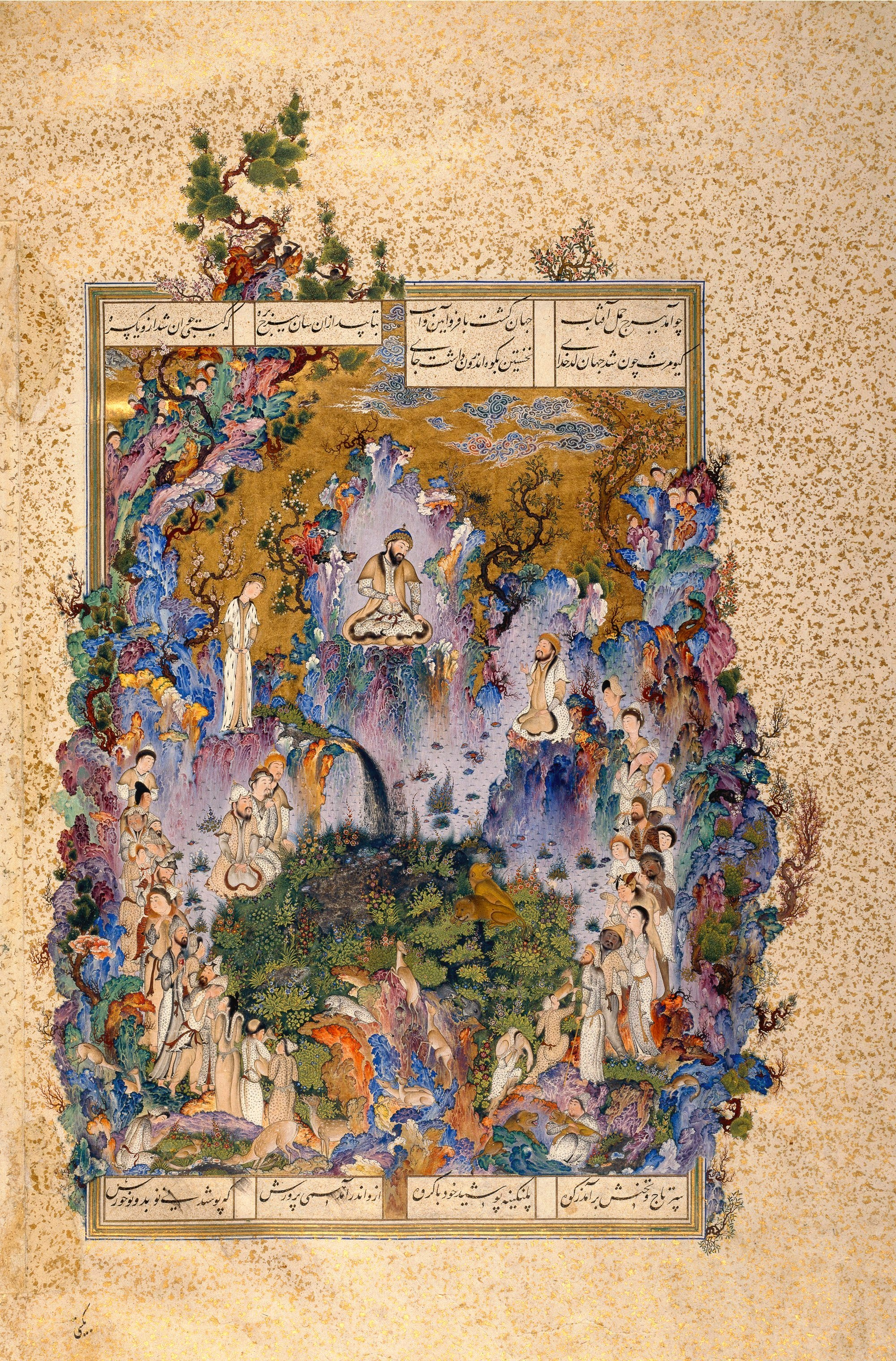 Султан Мухаммед. Двор Каюмарса. Миниатюра, деталь. «Шахнаме» Фирдоуси. 1525—1535 годы. Женева, Собрание Садруддина Ага-хана.